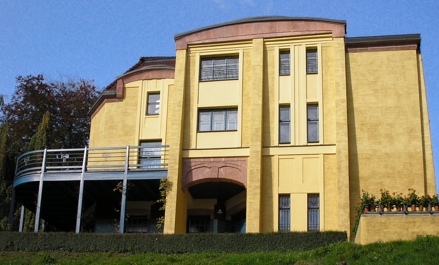 Die Villa Esche in Chemnitz (Sachsen).